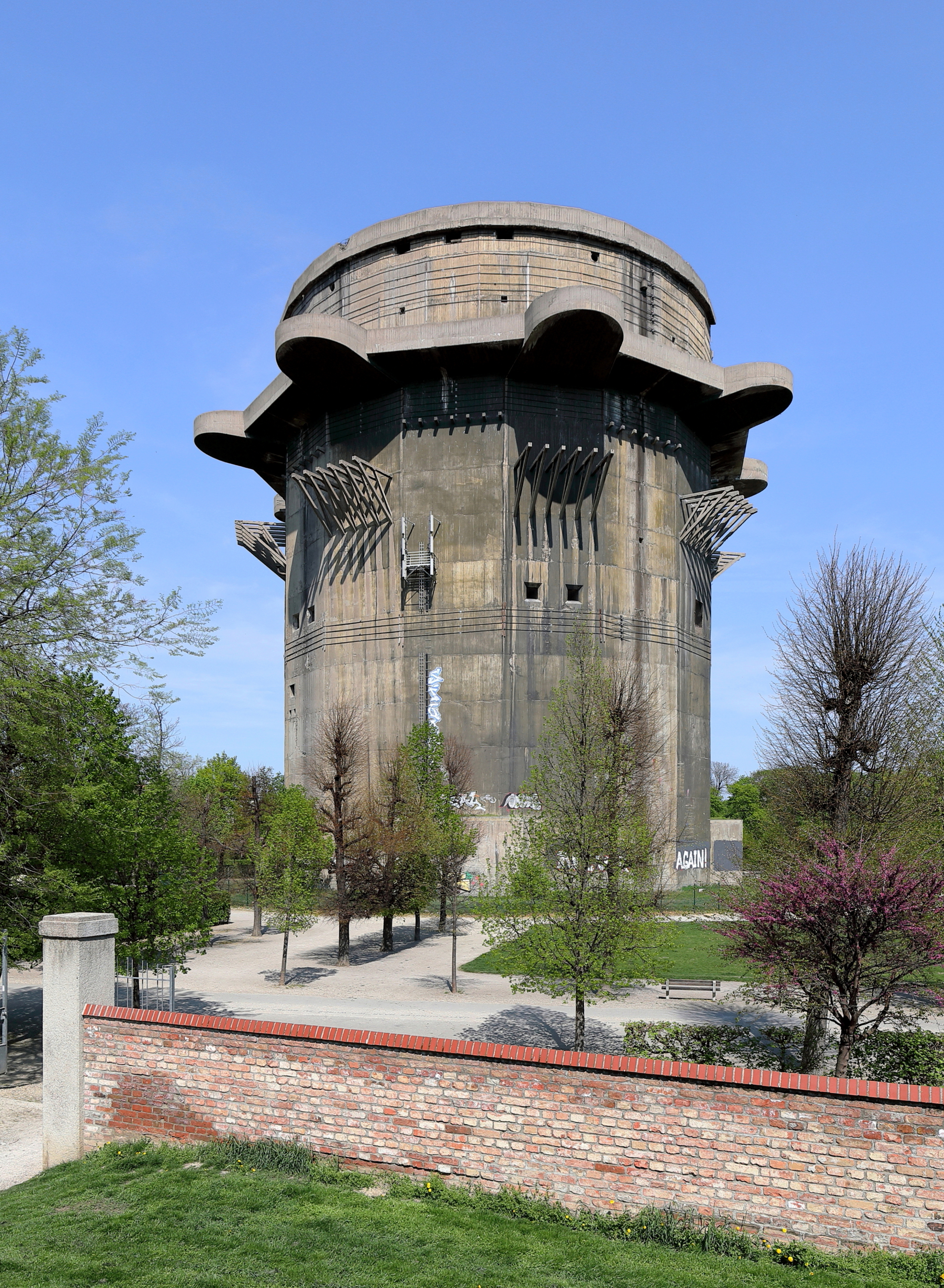 Der Flakturm (Geschützturm) im Augarten des 2. Wiener Gemeindebezirkes Leopoldstadt. Der Geschützturm und der Leitturm (rd. 400 m nordöstlicher) wurden von 1942 bis 1944 nach Plänen des Architekten Friedrich Tamms errichtet. Der Geschützturm hat einen Durchmesser von rd. 43 m, eine Wanddicke von rd. 2,5 m und die Deckenstärke beträgt rd. 3,5 m. Weitere Flakturmpaare gibt es in Wien im Arenbergpark und in der Stiftskaserne (Geschützturm) / Esterházypark (Leitturm).